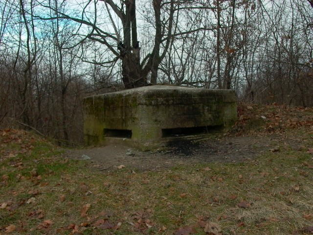 Czarnowo - betonowy schron obserwacyjny na wale dzieła pośredniego D-8 Twierdzy Modlin.